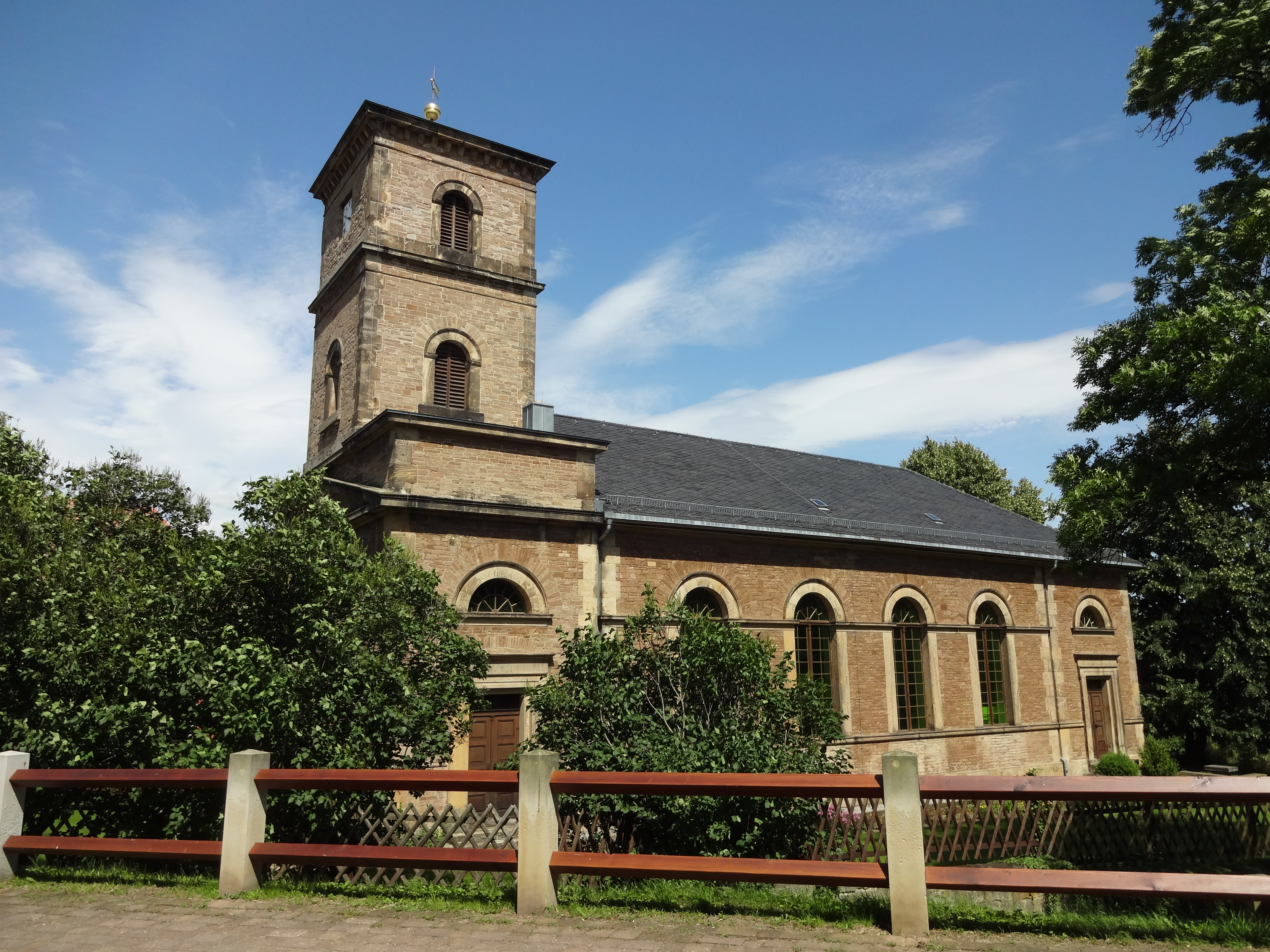 denkmalgeschützte Kirche in Börnecke, Ortsteil von Blankenburg/Harz